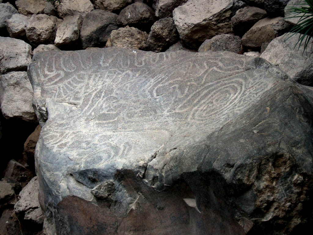 Cueva de Belmaco, Petroglyphen